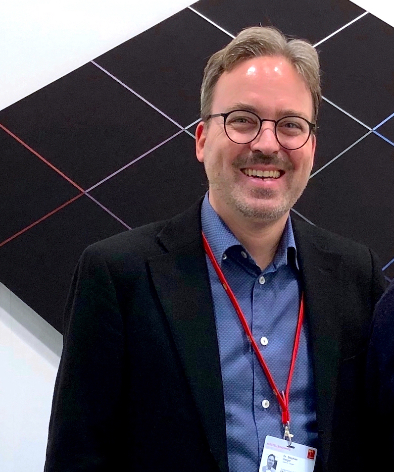 Stephan Geiger aufgenommen bei einem Fototermin auf der art Karlsruhe im Februar 2020